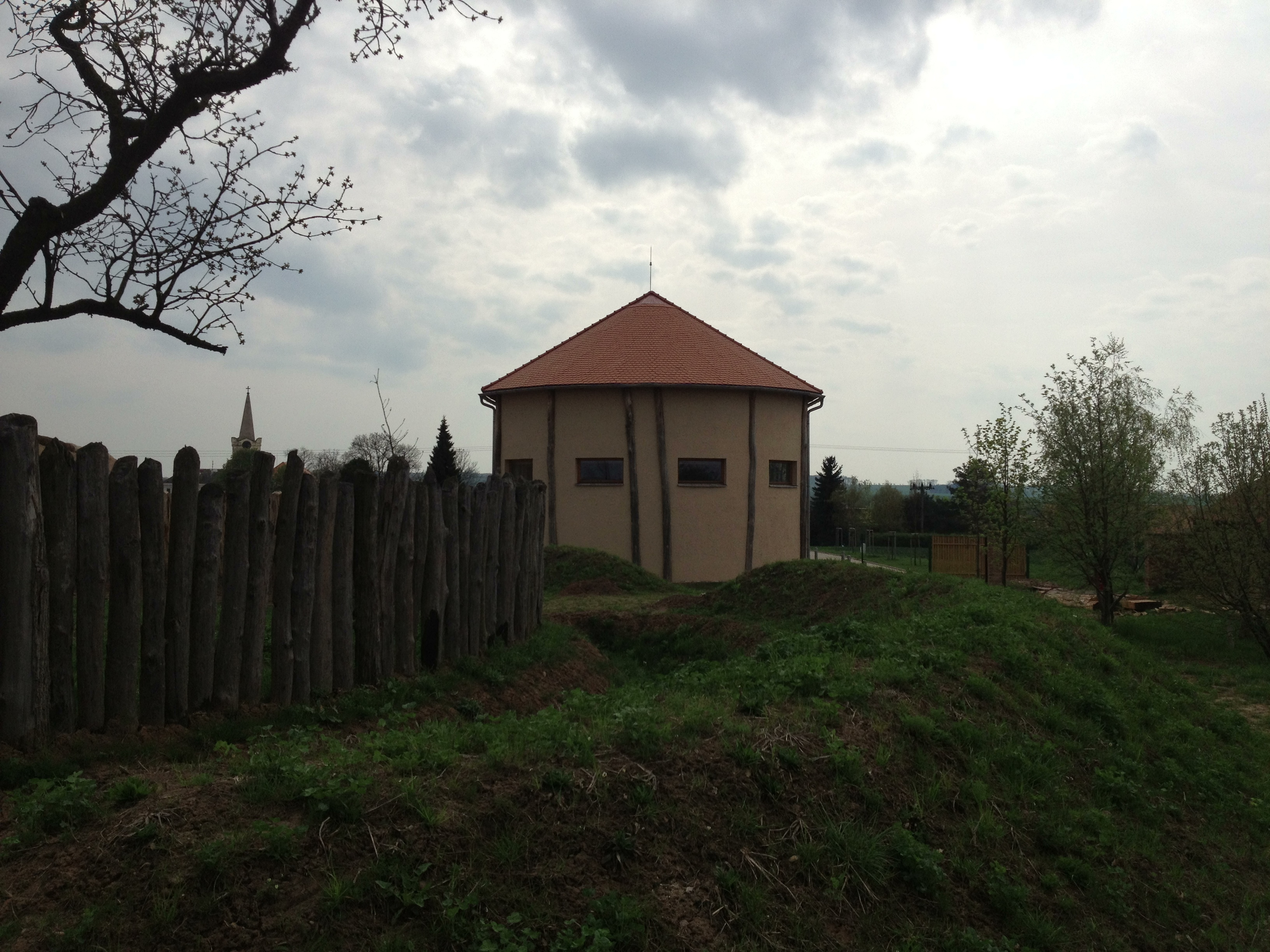 Archeopark pravěku ve Všestarech